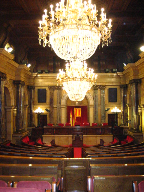 Hemicicle del Parlament de Catalunya